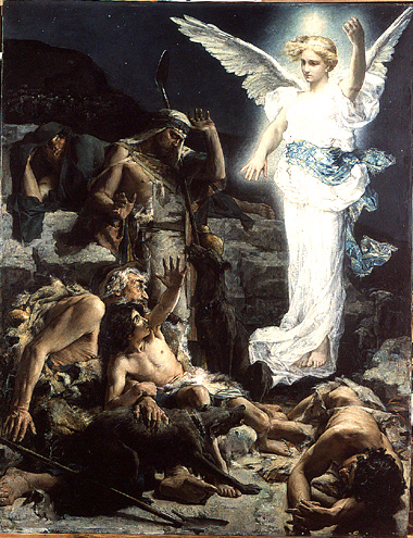 Léon Comerre, L'Annonce aux bergers, 1875, Paris, Ecole Nationale Supérieure des Beaux-Arts